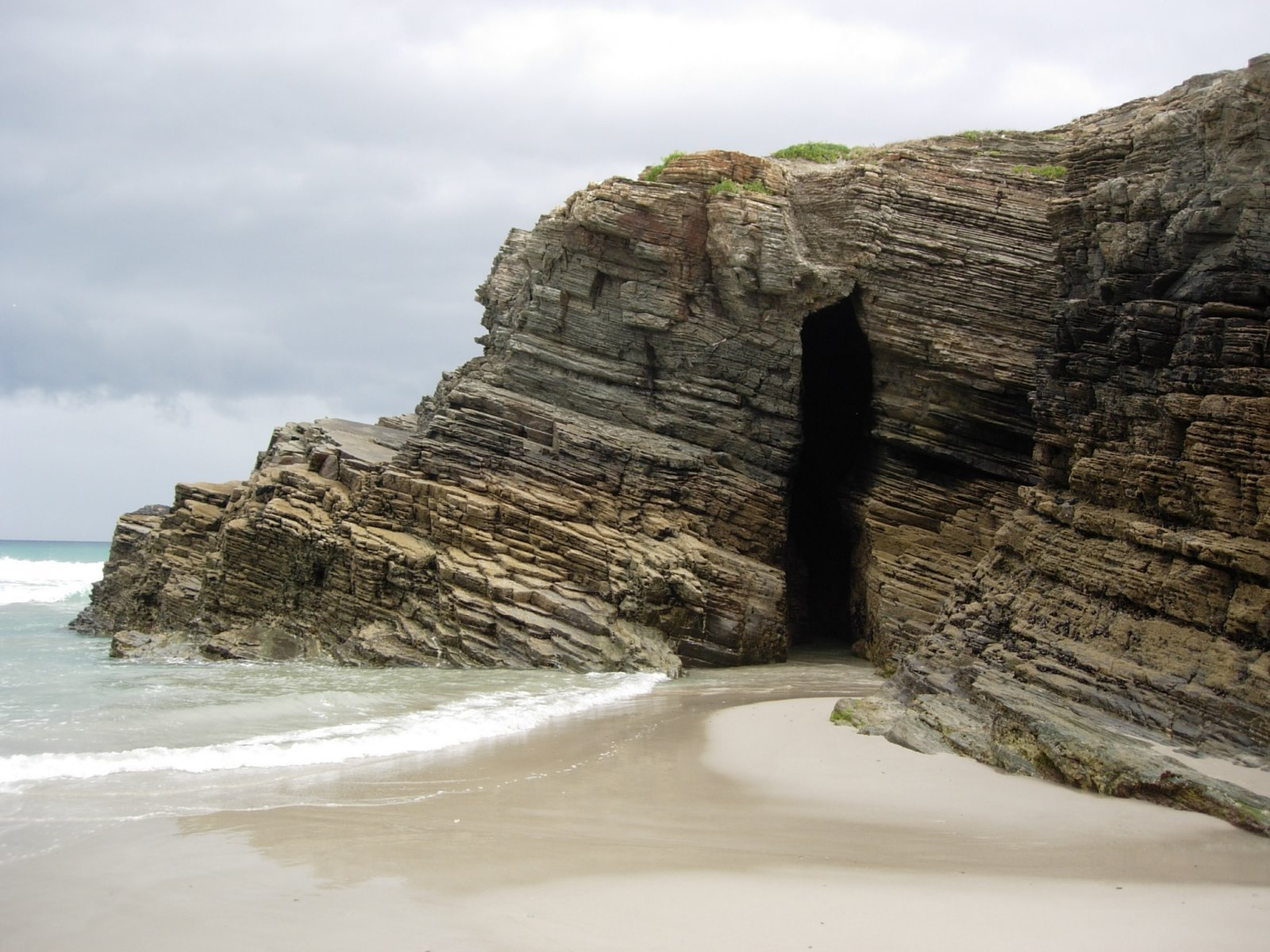 A Praia das Catedrais (Ribadeo) Licensing Categoría:Imaxes de Ribadeo